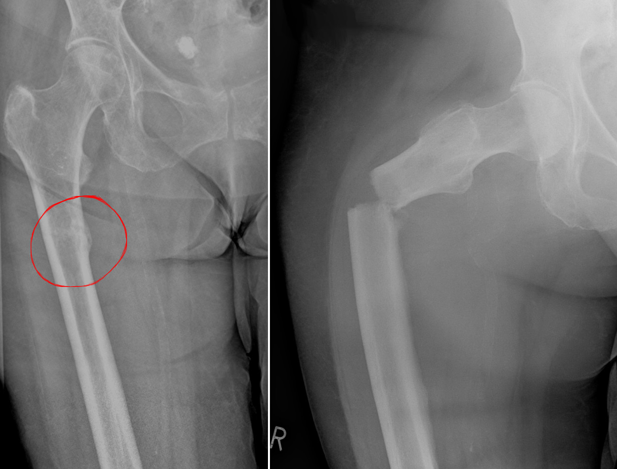 Pathologische Fraktur bei einer Knochenmetastase bei Mammakarzinom. Links die Metastase, rechts wenige Tage später die pathologische Fraktur.